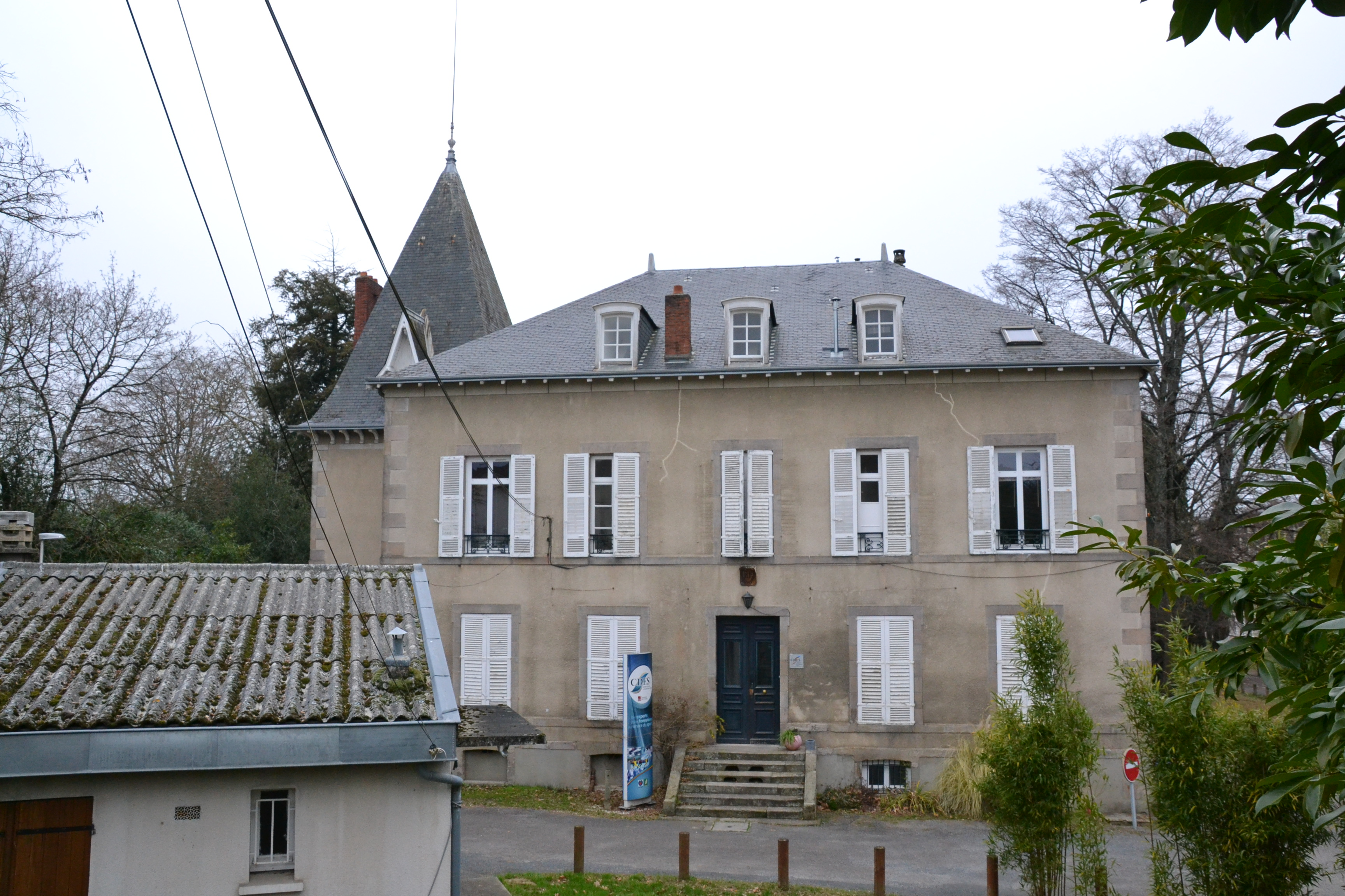 Bâtiment du Centre de droit et d'économie du sport de Limoges (Haute-Vienne, France).